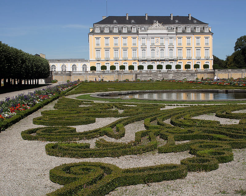 Schloss Augustusburg in der Stadt Brühl